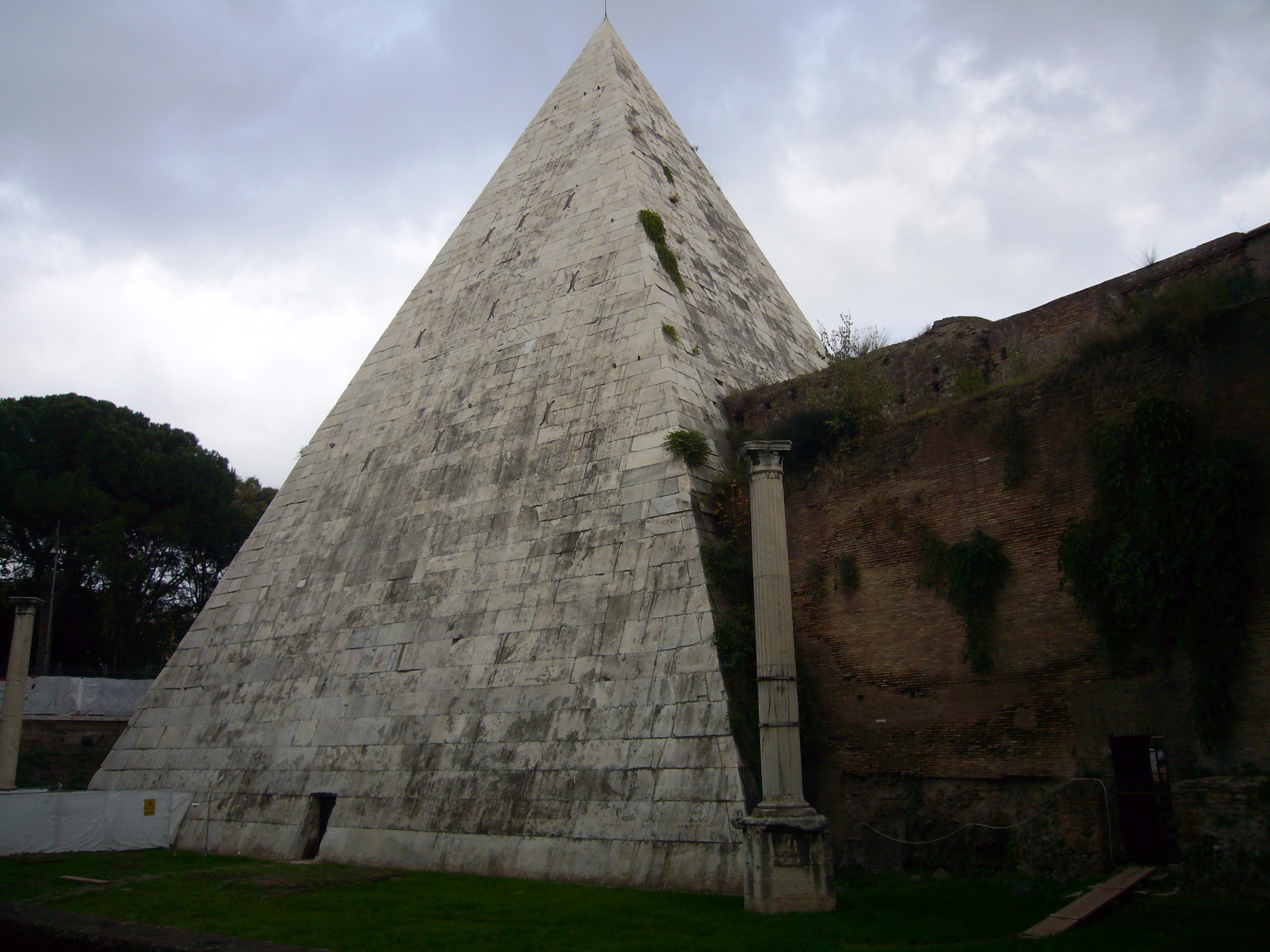 Roma, Piramide di Caio Cestio: lato interno alle mura, sul Cimitero degli Inglesi.